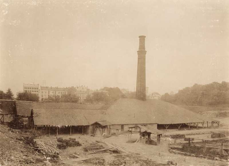 Bislett teglverk, revet 6. juni 1899, skorstein, bygårder.